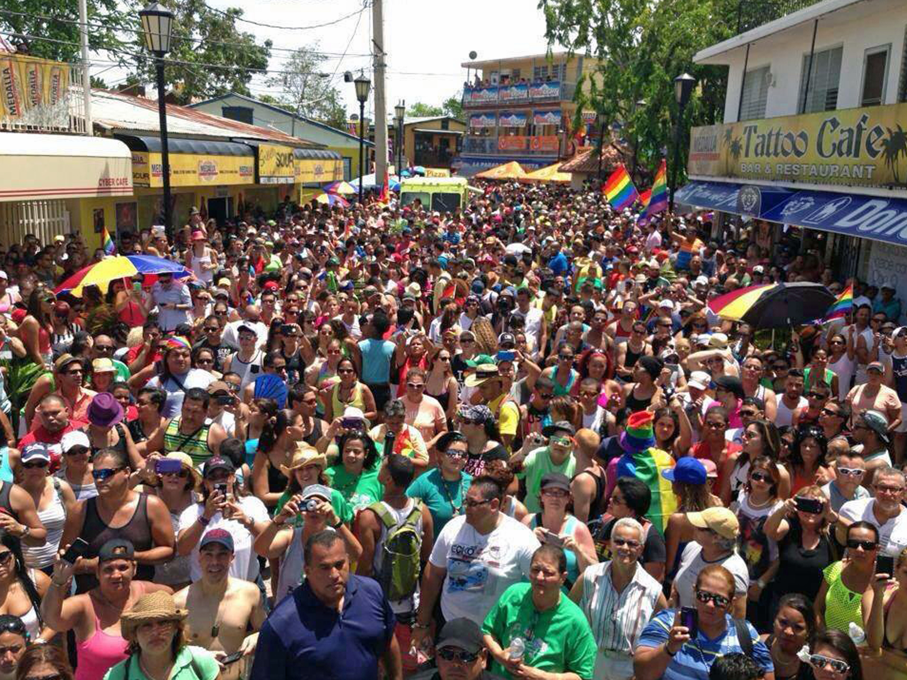 Festival Orgullo LGBTT - Boquerón